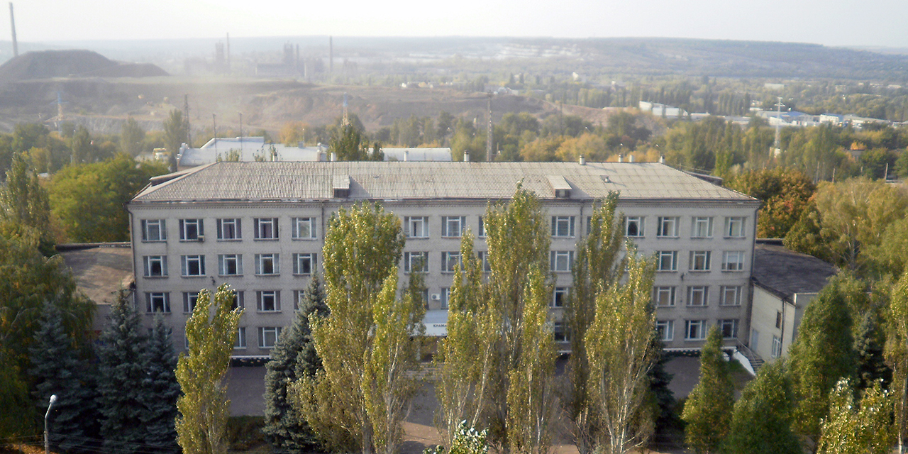 Учебный корпус колледжа